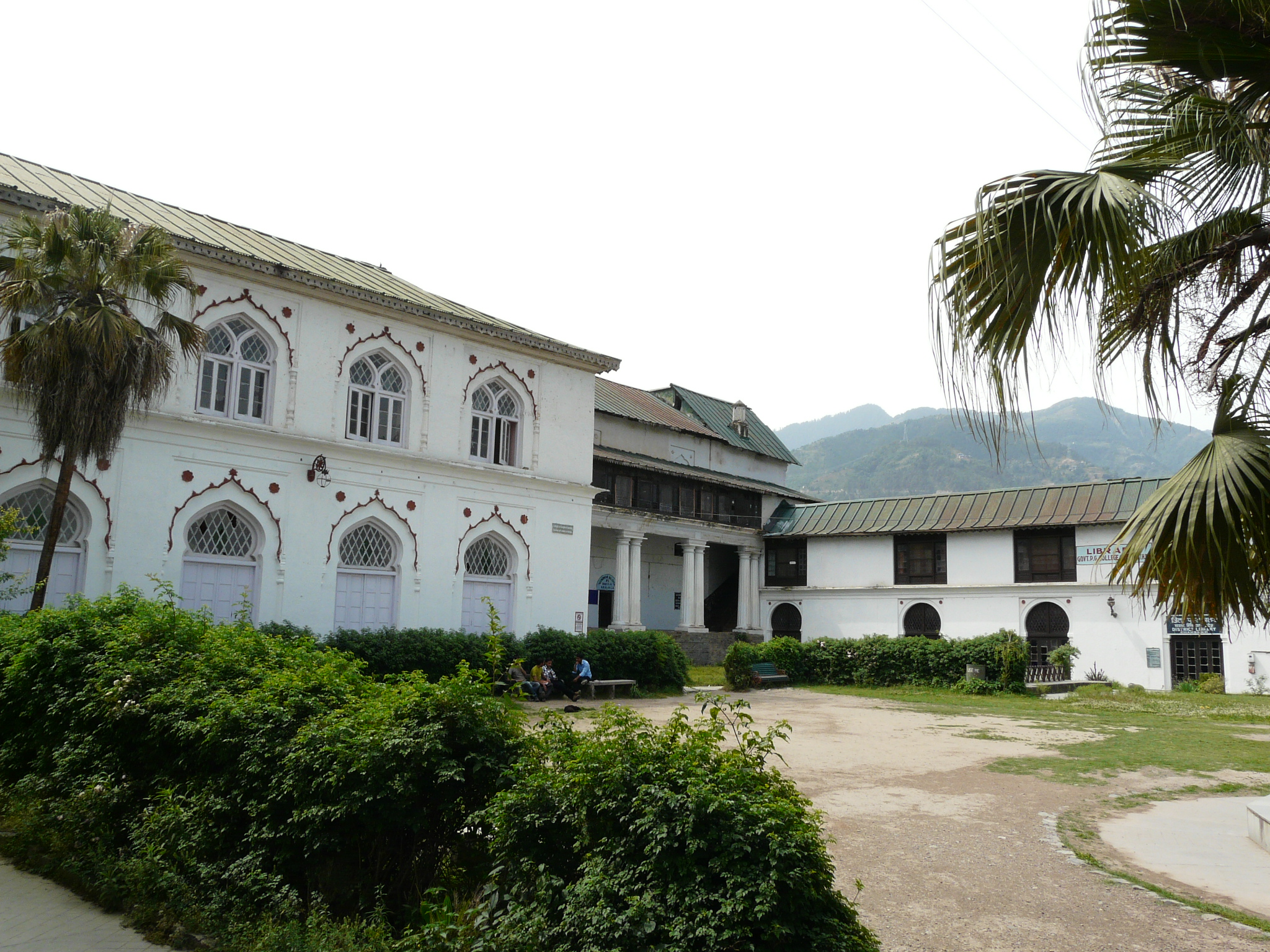 Akhand Chandi Palace Chamba, Himachal Pradesh, India